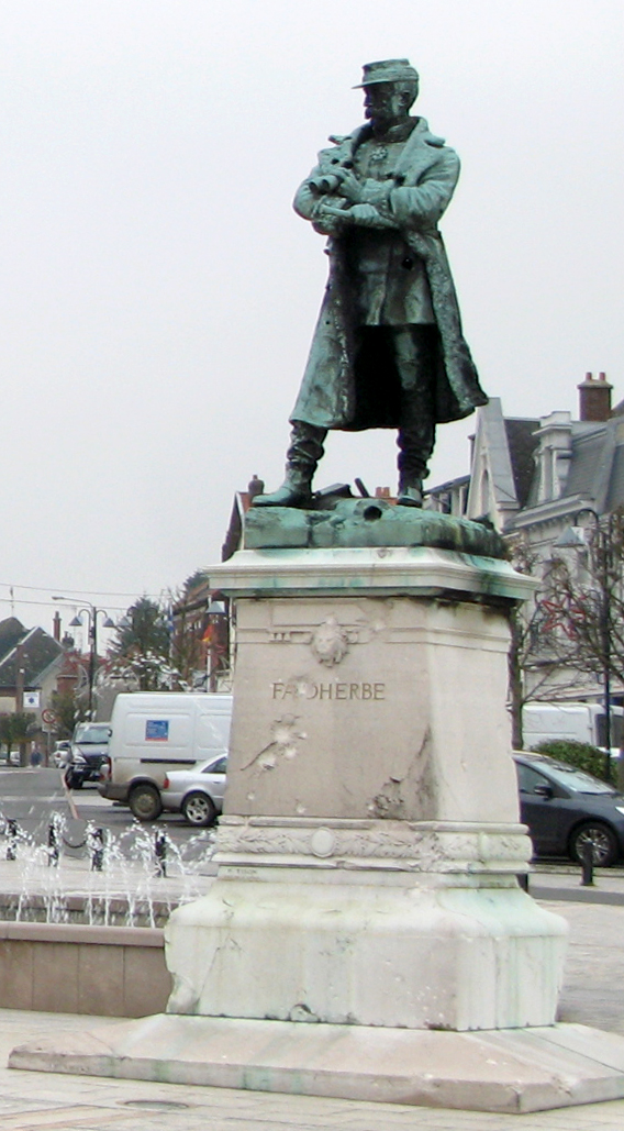 Bapaume (Pas-de-Calais, France) - La statue de Faidherbe sur la place de l'hôtel-de-ville. .